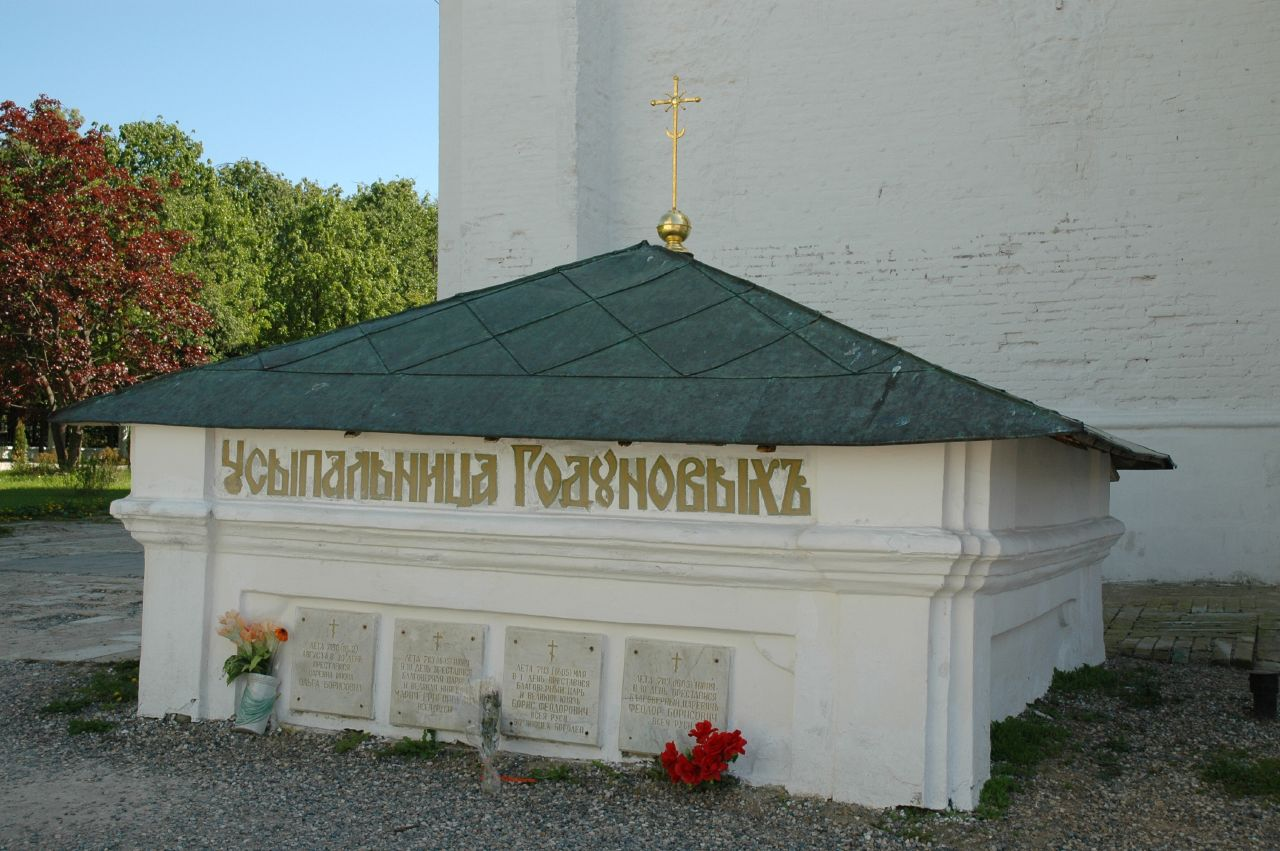 Усыпальница Годуновых в Свято-Троицкой Сергиевой Лавре. (Сергиев Посад)